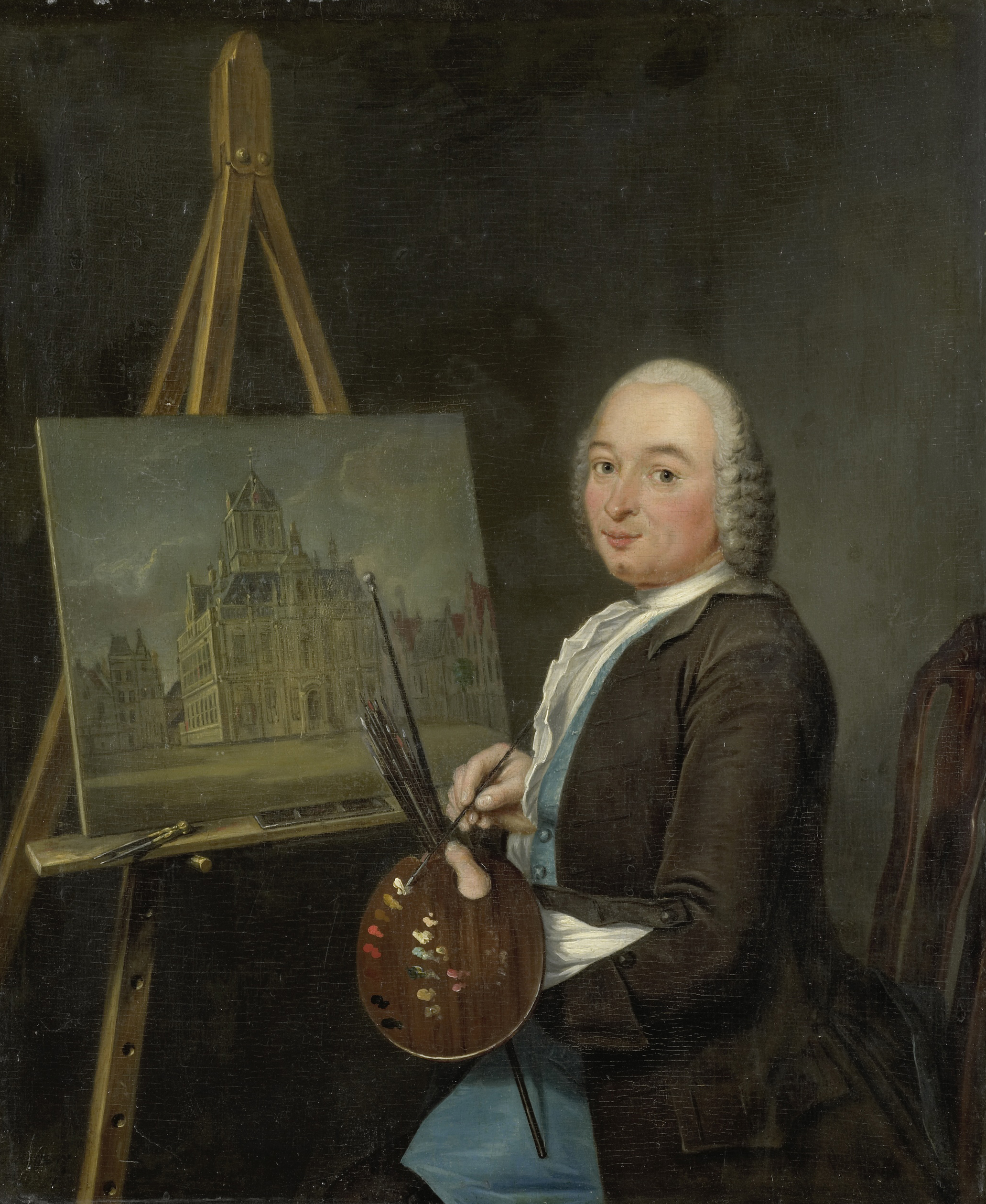 Portret van Jan ten Compe (1713-61), schilder en kunsthandelaar te Amsterdam. De schilder zit met palet en penselen in de hand achter een schilderij met een voorstelling van het stadhuis van Delft.